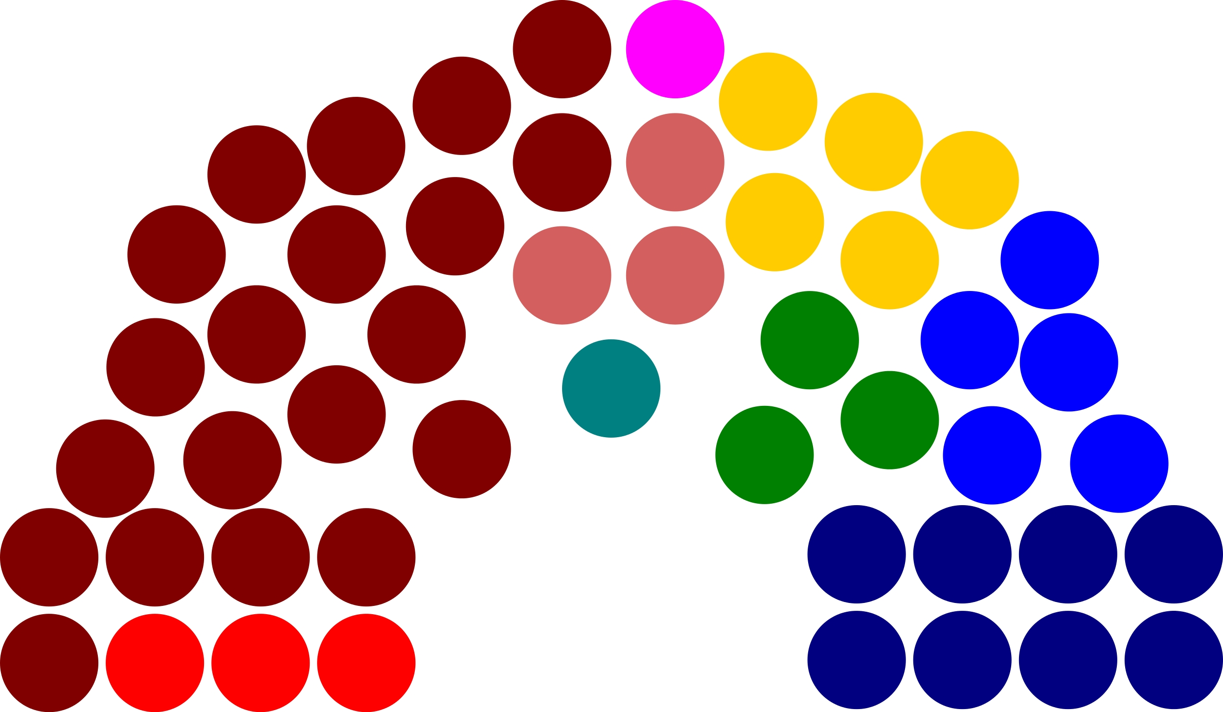 Composizione del Consiglio Regionale del Friuli Venezia Giulia dopo le elezioni tenutesi nel 2013.